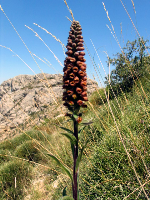 Digitalis parviflora in Sierra del Moncayo, Zaragoza